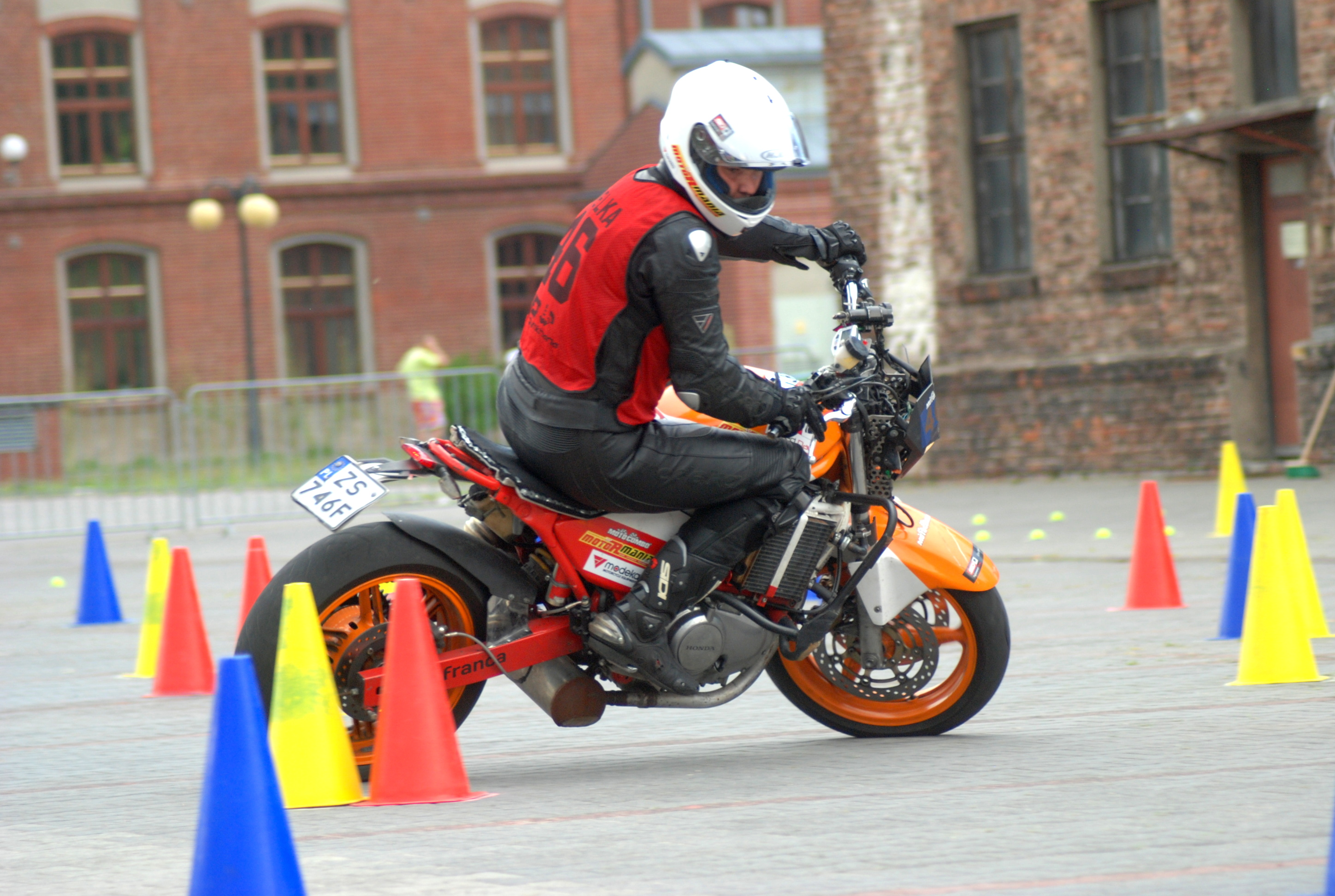 Smelka na własnoręcznie skostruowanym motocyklu Honda Franca Custom podczas przejazdu konkursowego na 3. rundzie Gymkhana GP w Łodzi. 26 lipca 2014